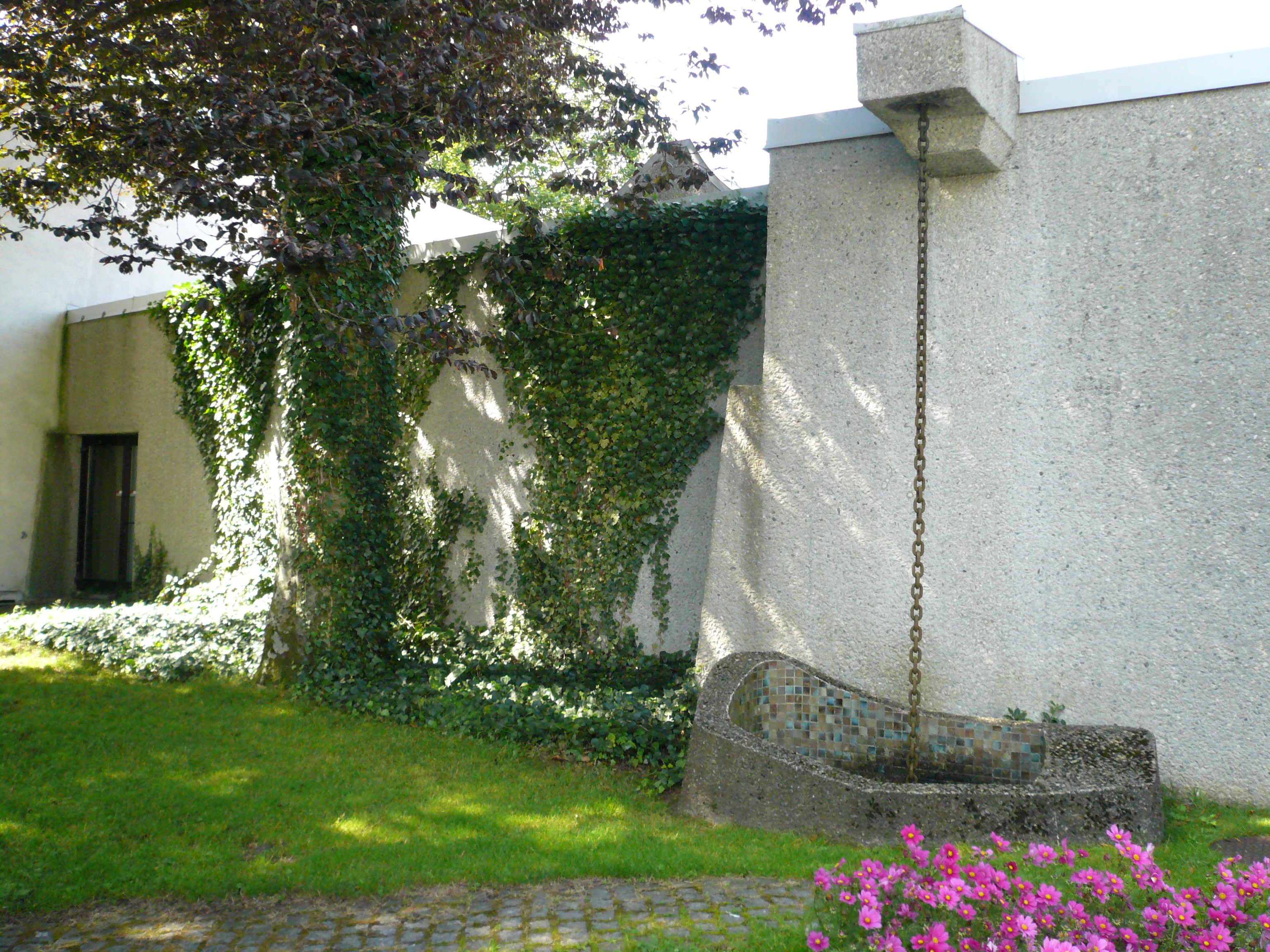 Haugesund Billedgalleri, eksteriør